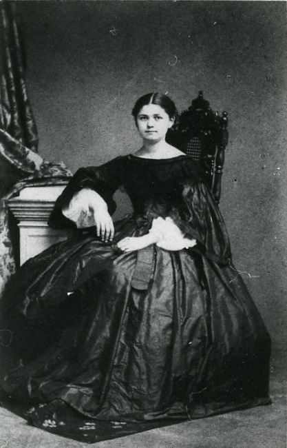 Bibianna Moraczewska (1811-1887). (Fot. Muzeum Narodowe w Poznaniu)